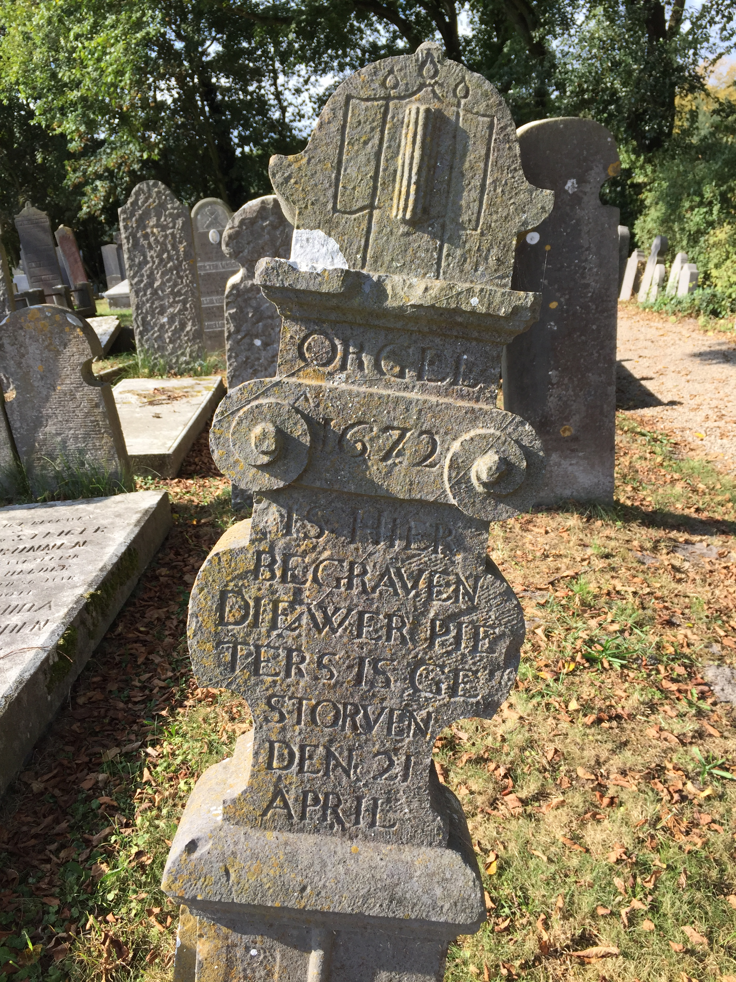 De oudste grafzerk op de Algemene Begraafplaats in Huisduinen (Den Helder). Hij stamt uit 1672.